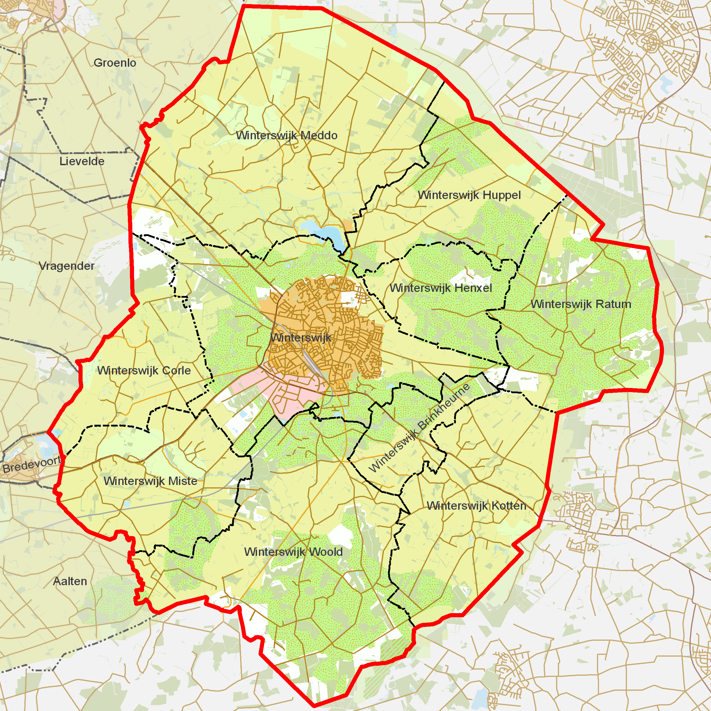 BAG woonplaatsen - Gemeente Winterswijk.png